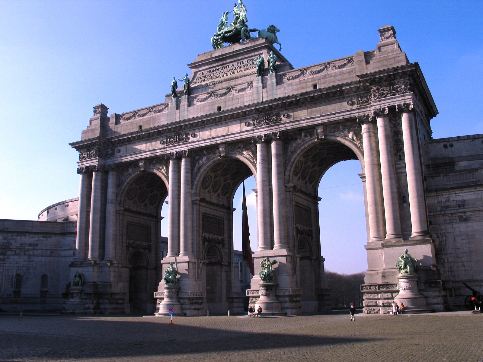 Triomfboog in het Jubelpark in Brussel (29 jan 2005) - eigen foto Categorie:afbeelding Brussel